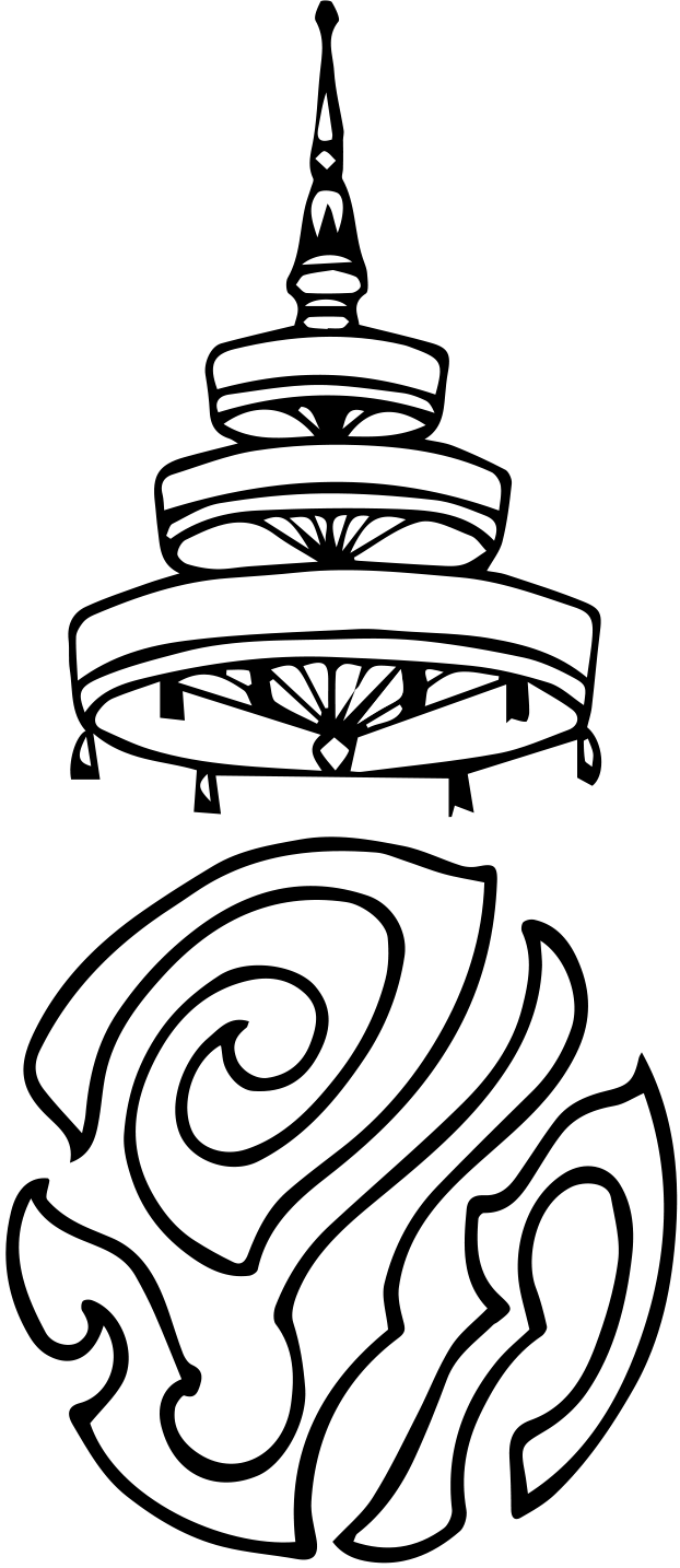 ตราประจำพระองค์ สมเด็จพระอริยวงศาคตญาณ (ปลด กิตติโสภณมหาเถร)